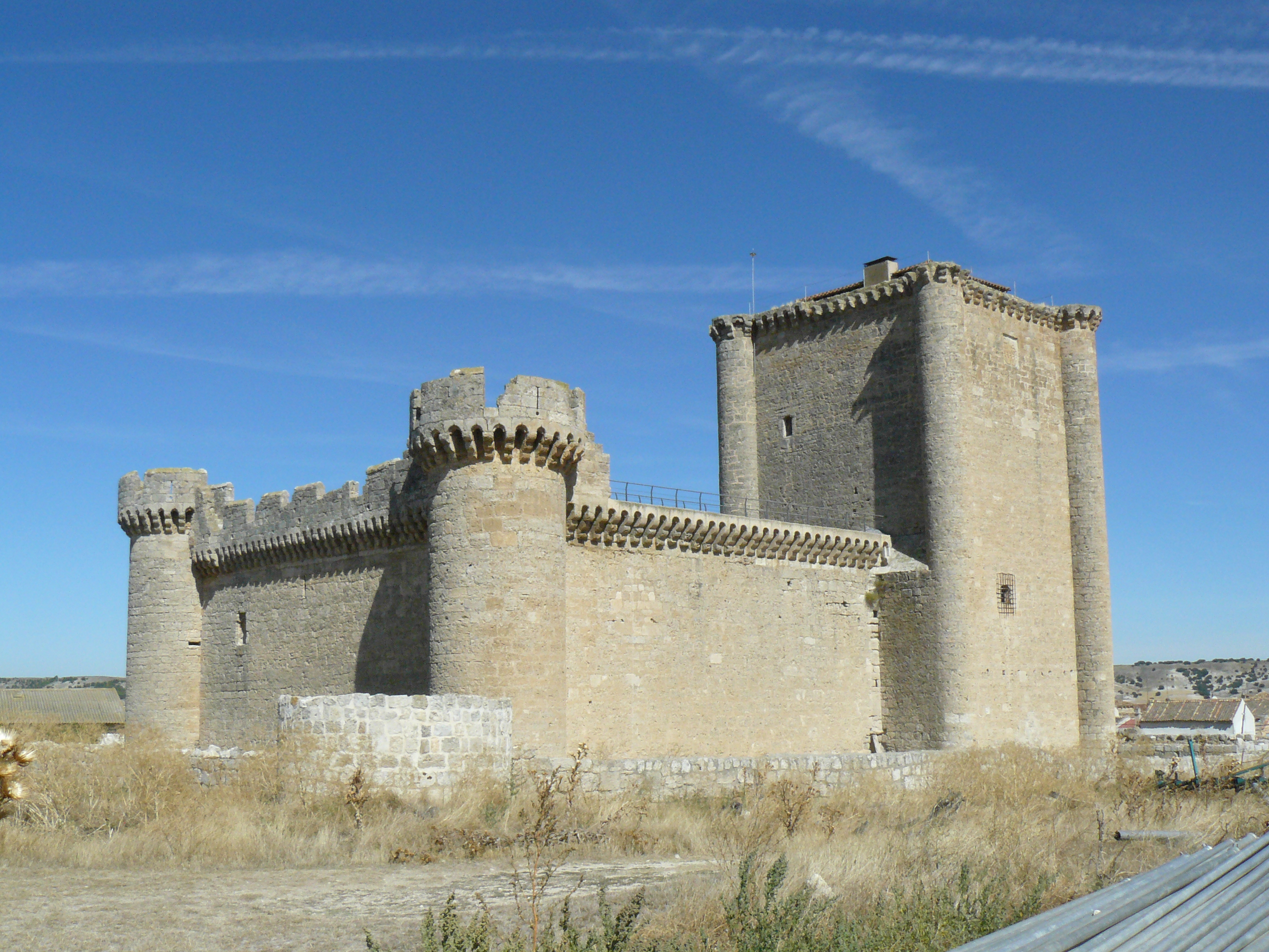 Villafuerte de Esgueva, Burgos.